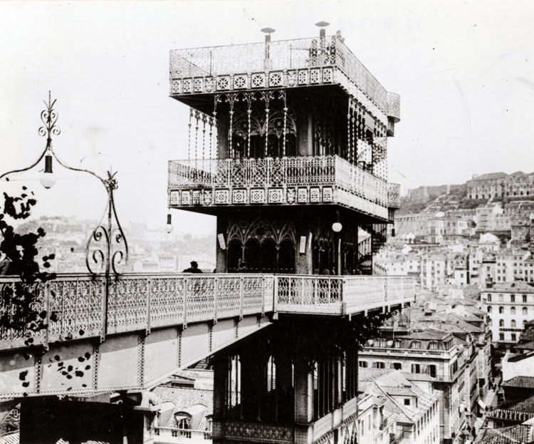 Funiculares de Lisboa.